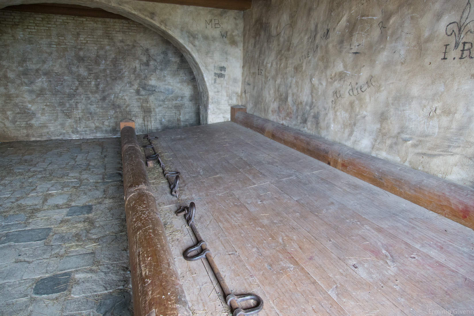 Ce grand "banc" en bois (aussi appelé "taulard") était l'emplacement où dormaient les détenus. Ils étaient enchainés par les pieds à un axe en métal traversant tout le banc. Une vingtaine de détenus pouvaient dormir côte à côte sur un banc comme celui-ci. Ce meuble est une reconstitution de la prison coloniale de la forteresse de Louisbourg, en Nouvelle France, au début du XVIIIème siècle. On retrouvait des aménagements du même type dans les bagnes de France (Brest, Toulon, Rochefort...).